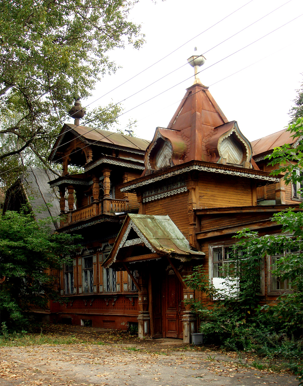 Особняк (Нижегородская область, Нижний Новгород, улица Дальняя, 15)